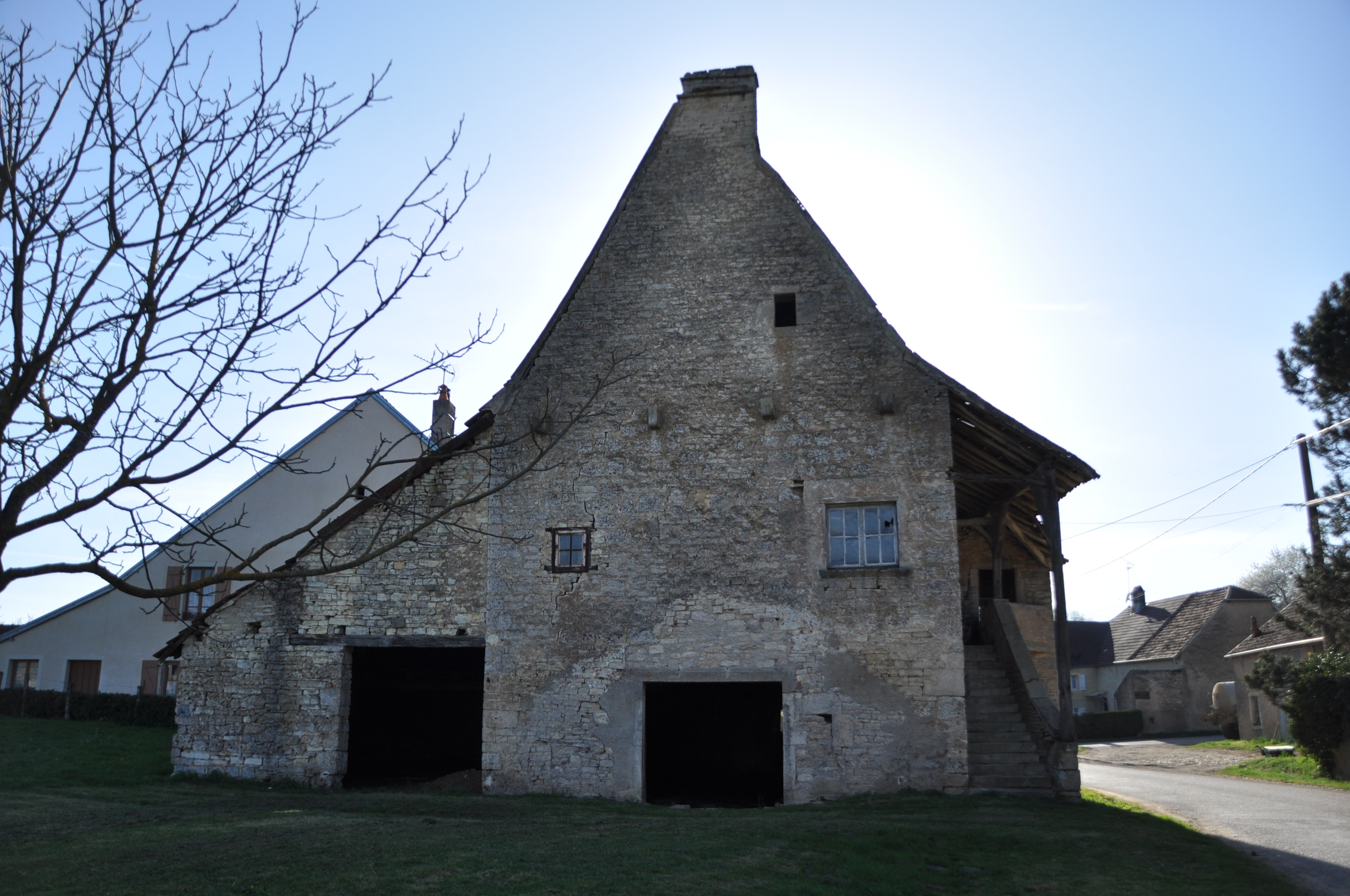 Maison de vigneron, (Inscrit, 1986) .